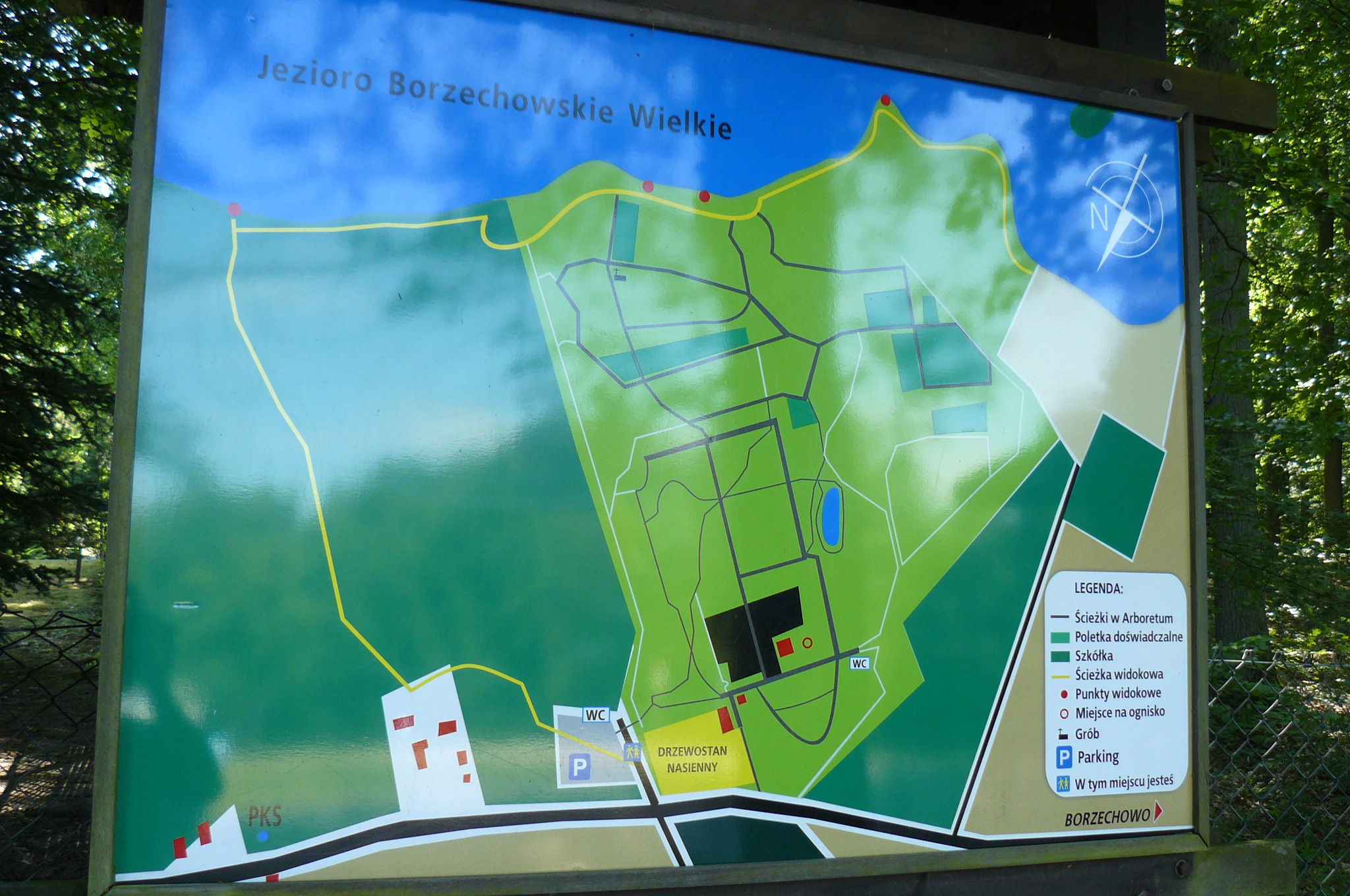 Wejście na teren Arboretum w Wiratch.